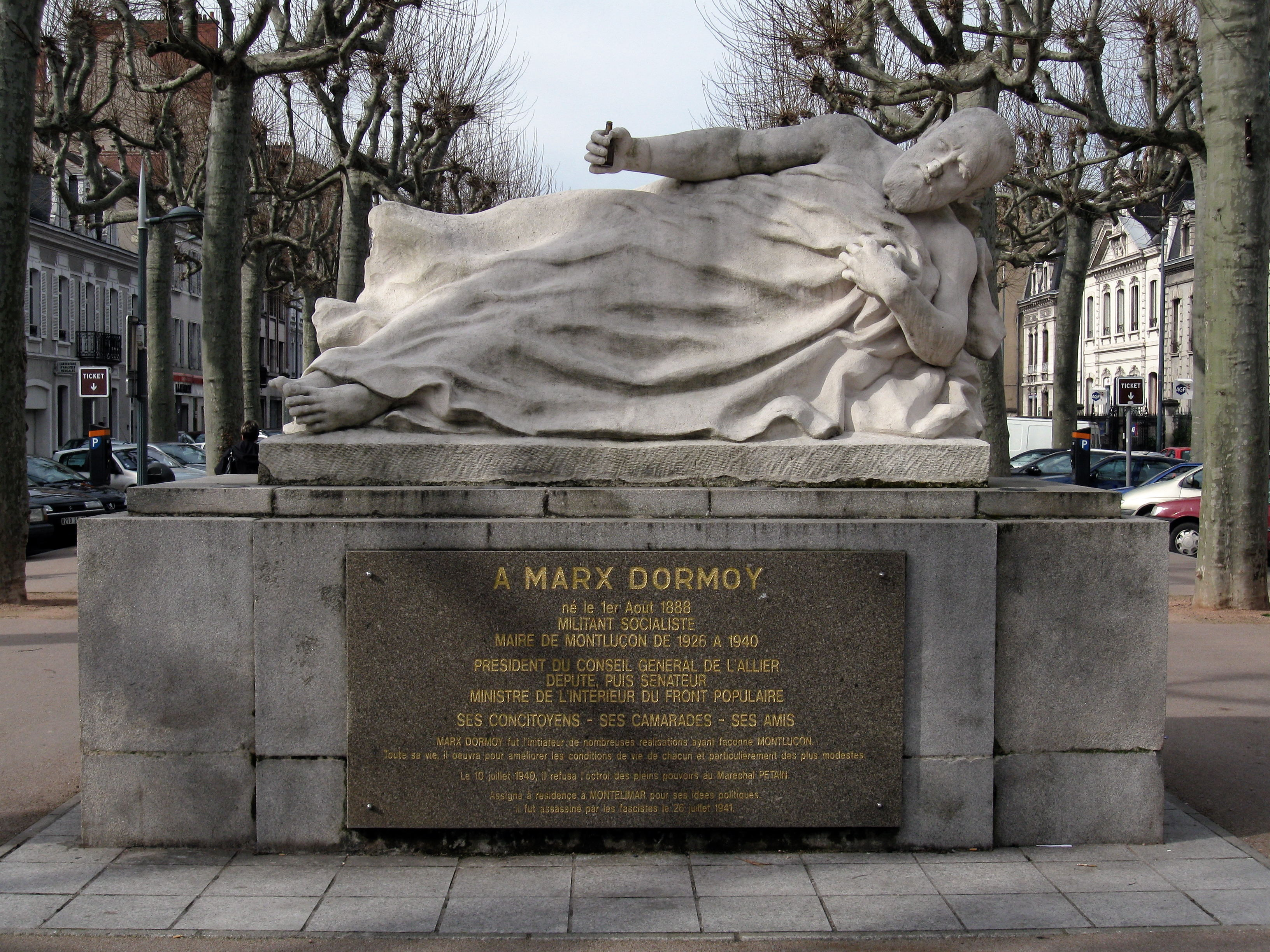 Monument à Marx Dormoy, Montluçon, Allier, France